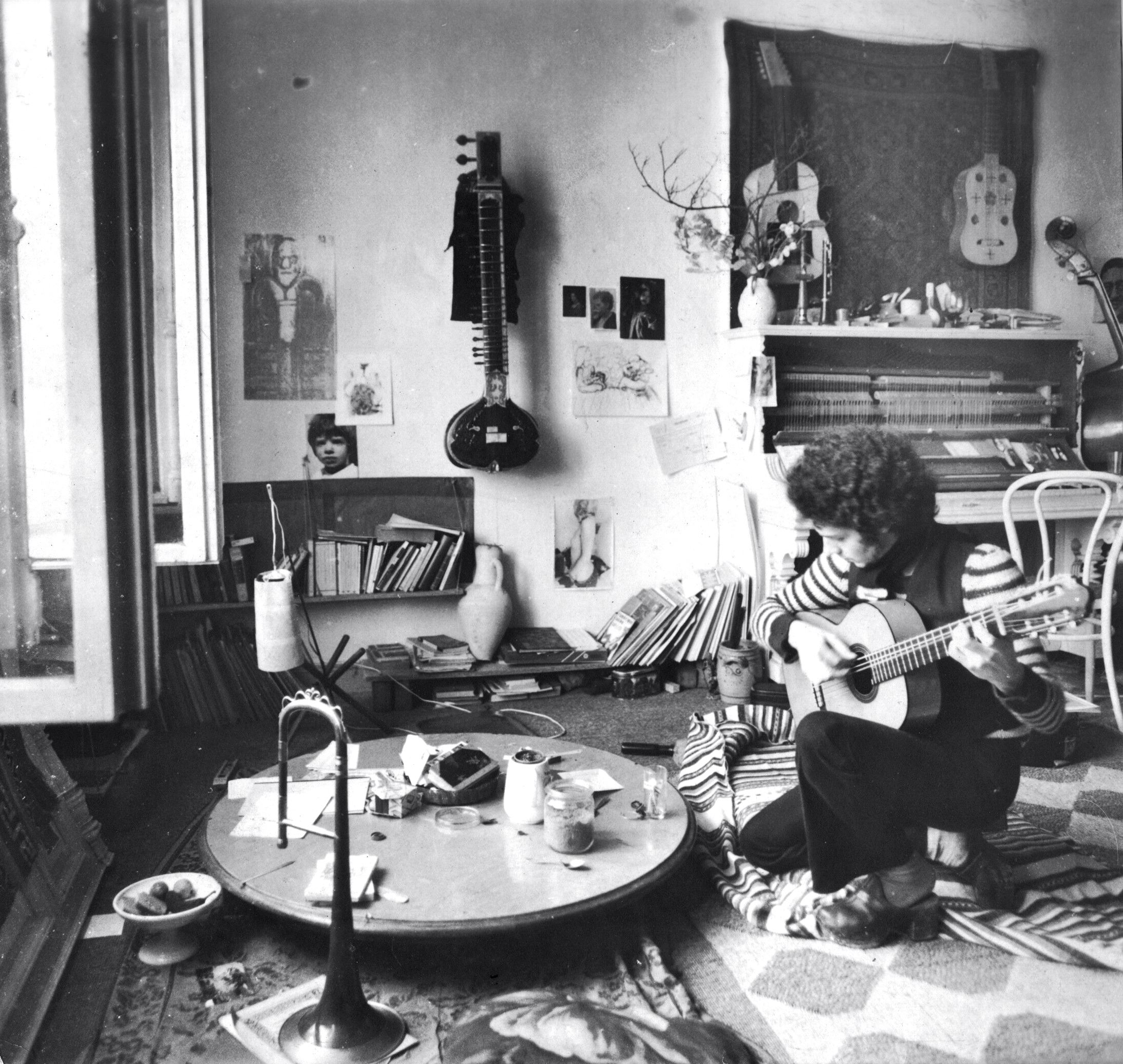 Meu quarto em Berlim em 1972